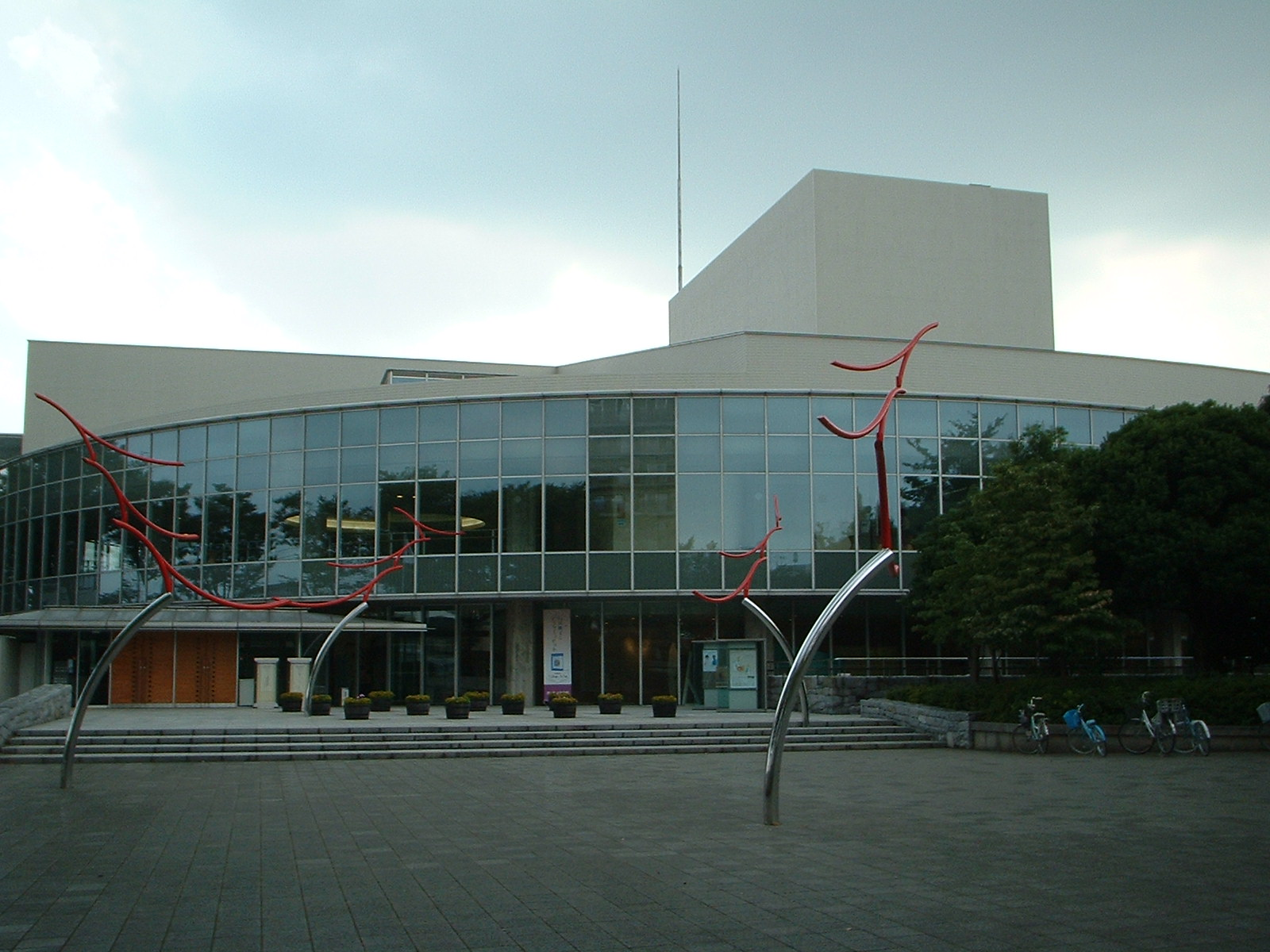 桶川市民ホールとさいたま文学館が併設された建物。響きの森はこれらの愛称。